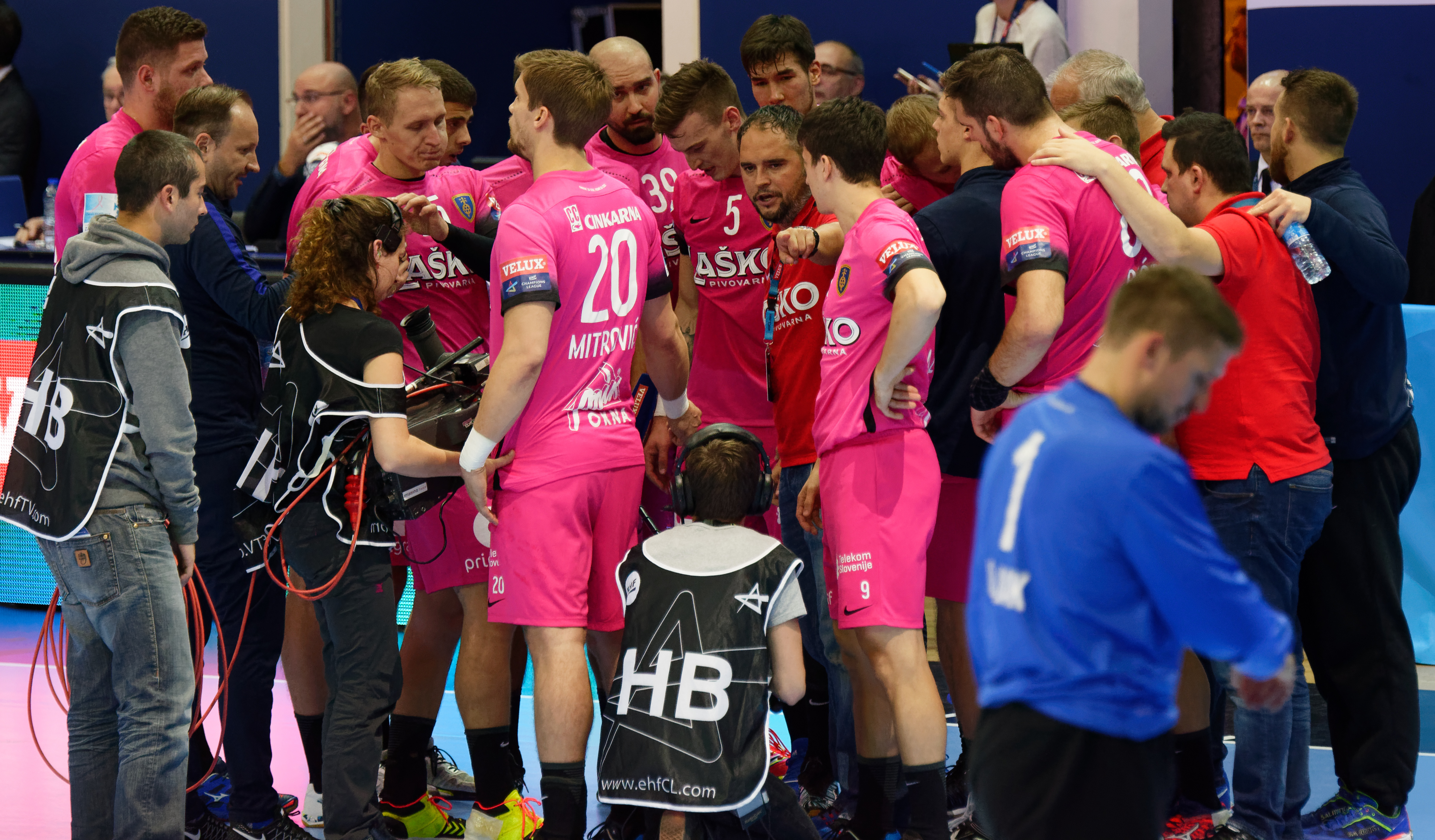 Rencontre de phase de groupe de la ligue des champions 2017/18 entre le PSG et Celje A Coubertin le 8 octobre 2017.